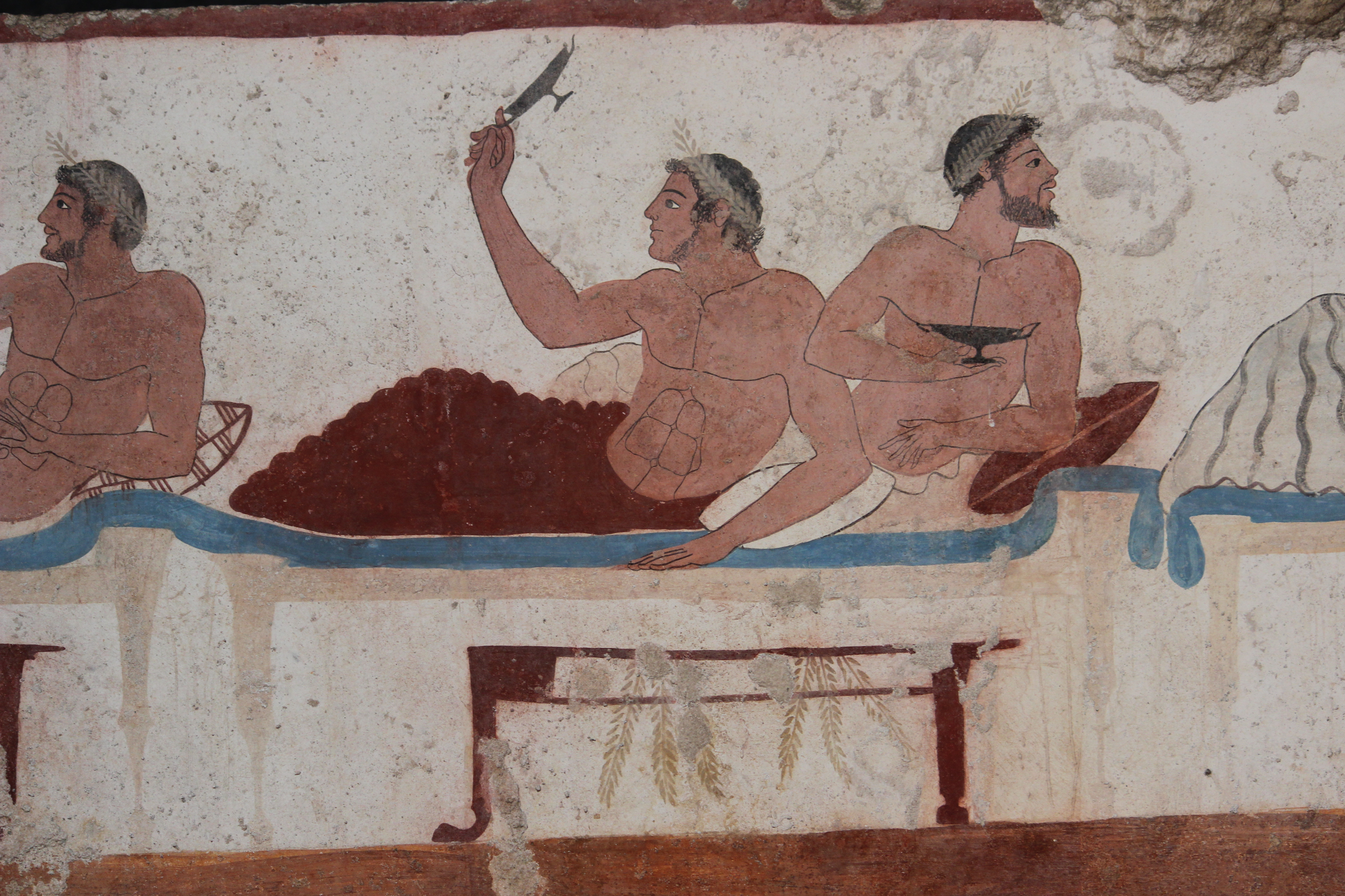 Paestum, Museo, pinturas de la tumba del nadador.